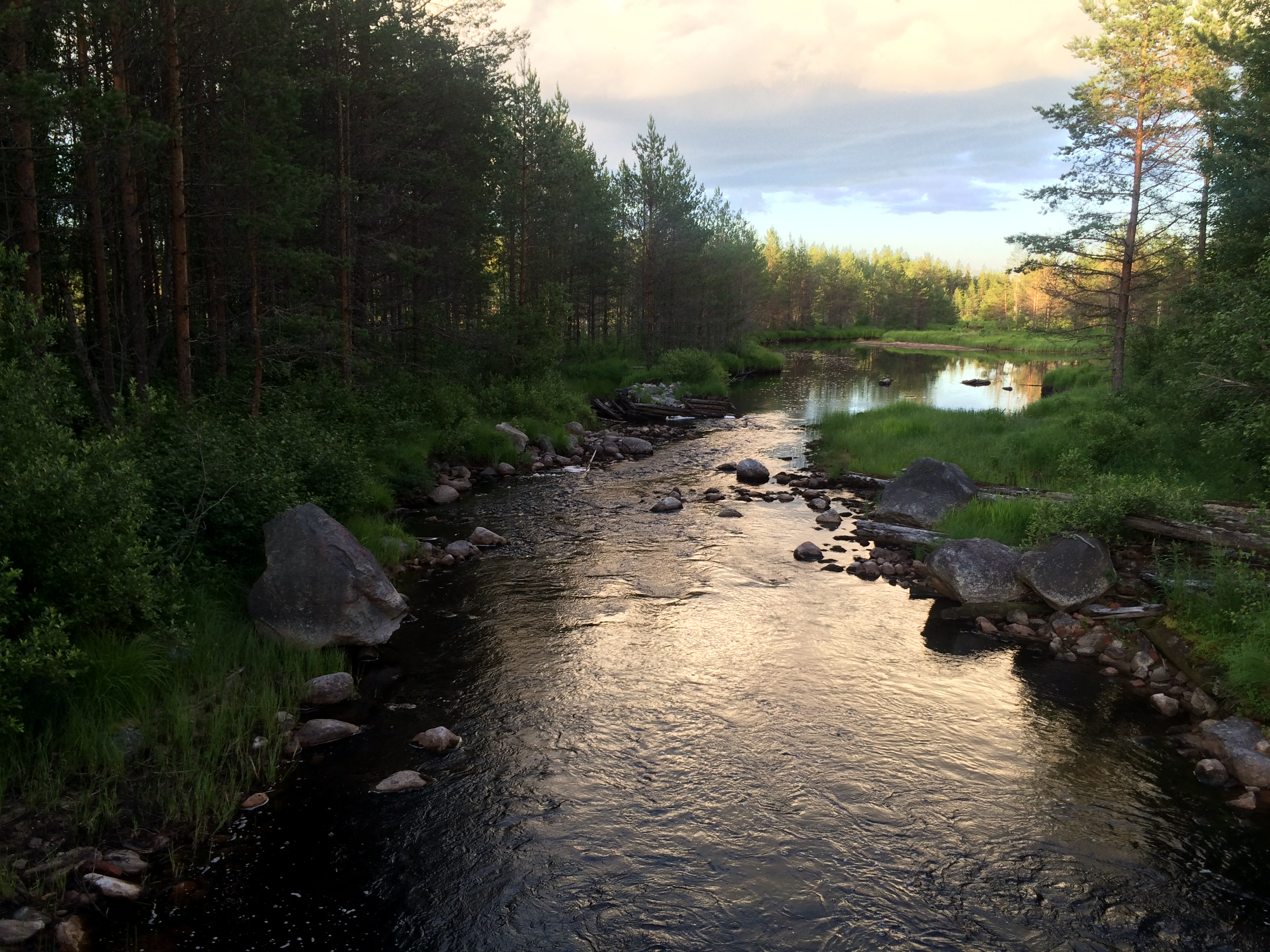 Иляйоки